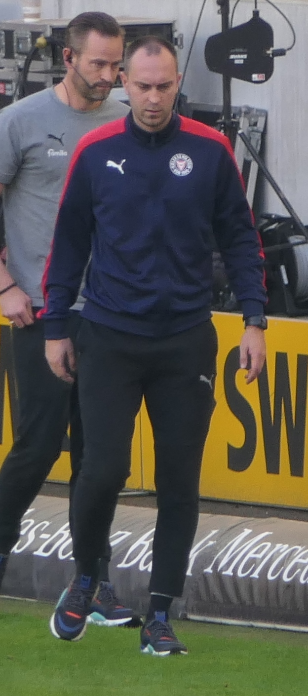 Der Fussballtrainer Ole Werner an der Seitenlinie von Holstein Kiel beim Auswärtsspiel gegen den VfB Stuttgart am 20.10.2019.